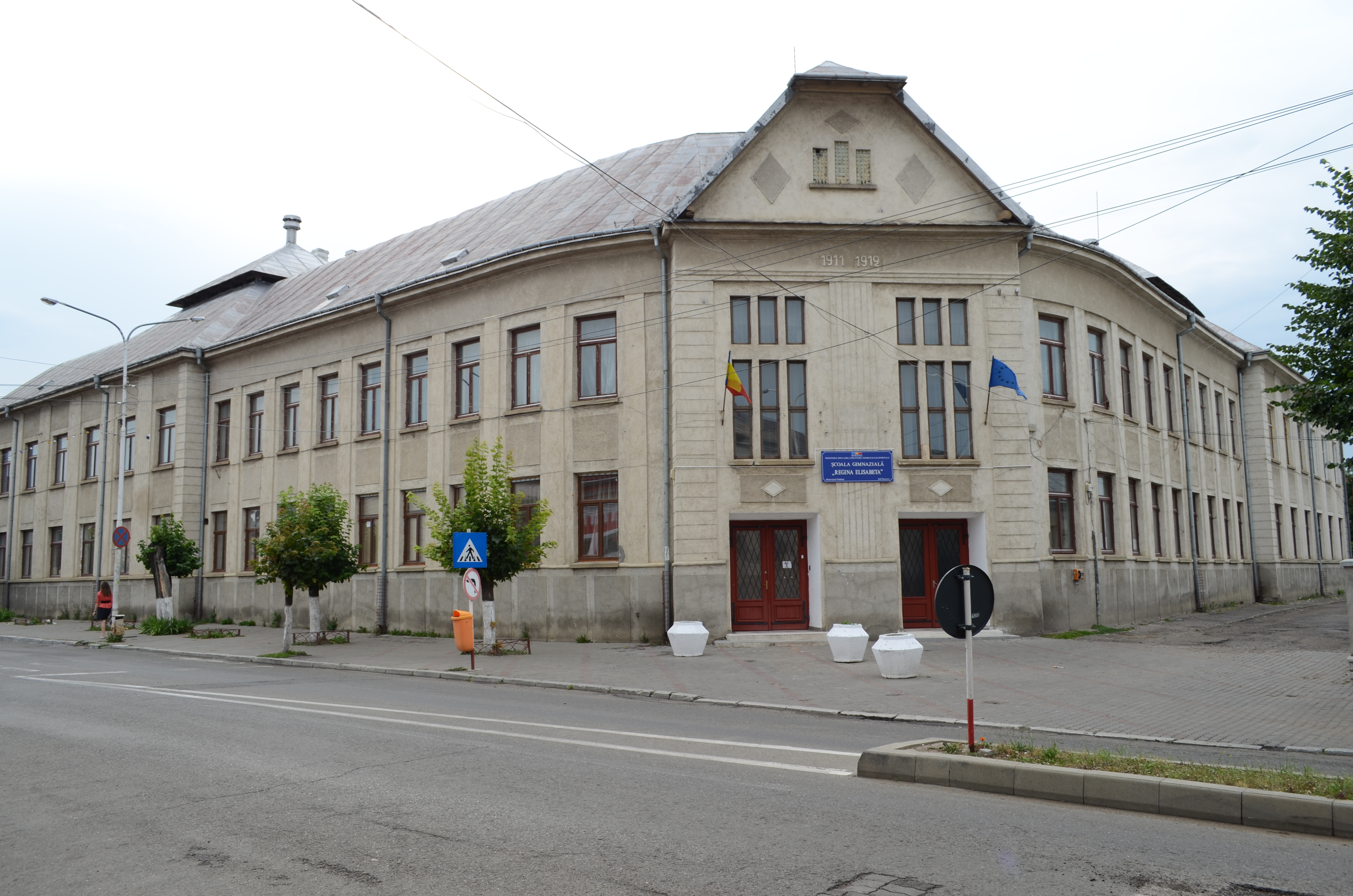 Școala nr. 4 "Regina Elisabeta", Str. Ștefan cel Mare nr. 18, Rădăuți